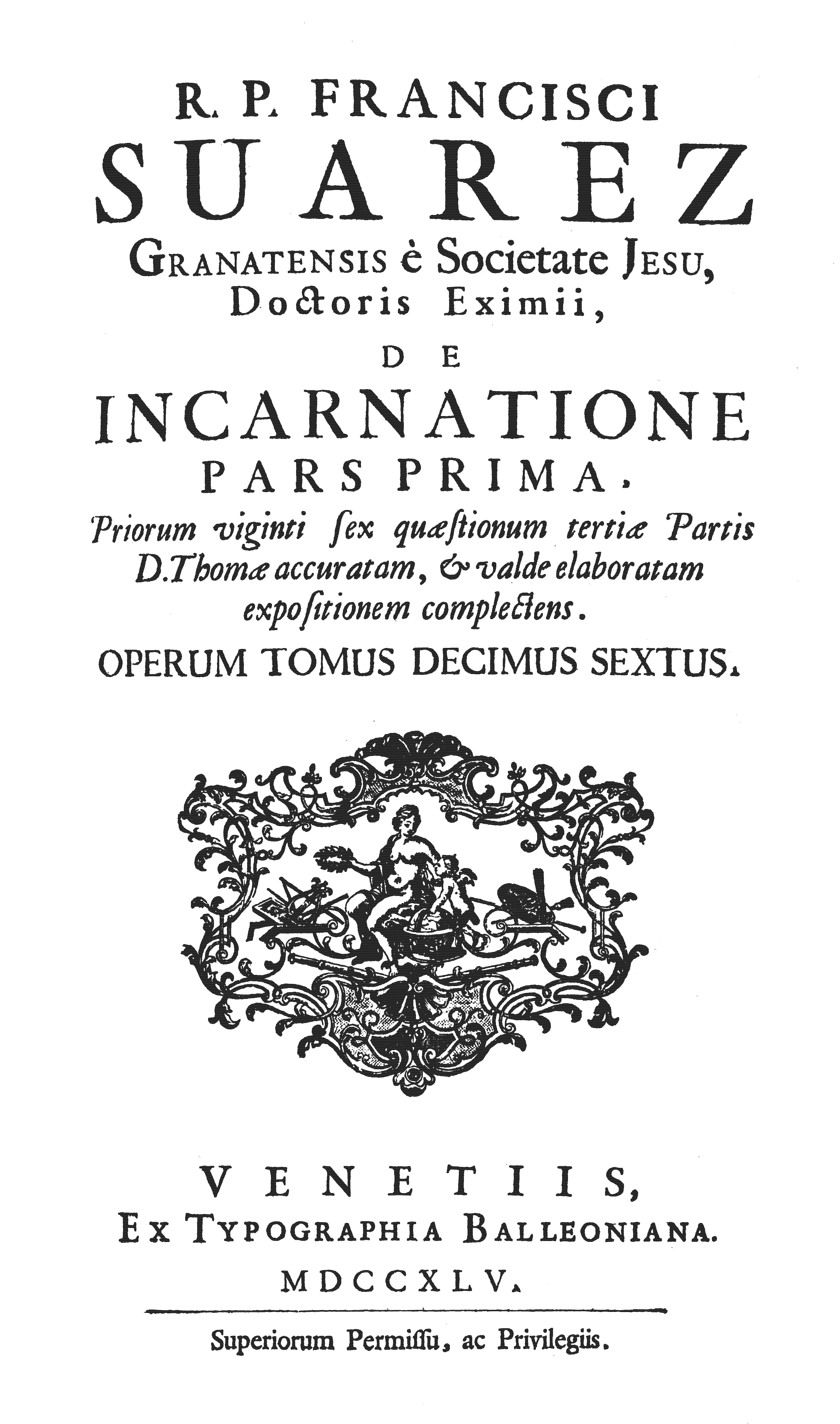 Portada del libro De incarnatione (parte primera). Publicado en latín por Francisco Suárez en Venecia, edición de 1745.